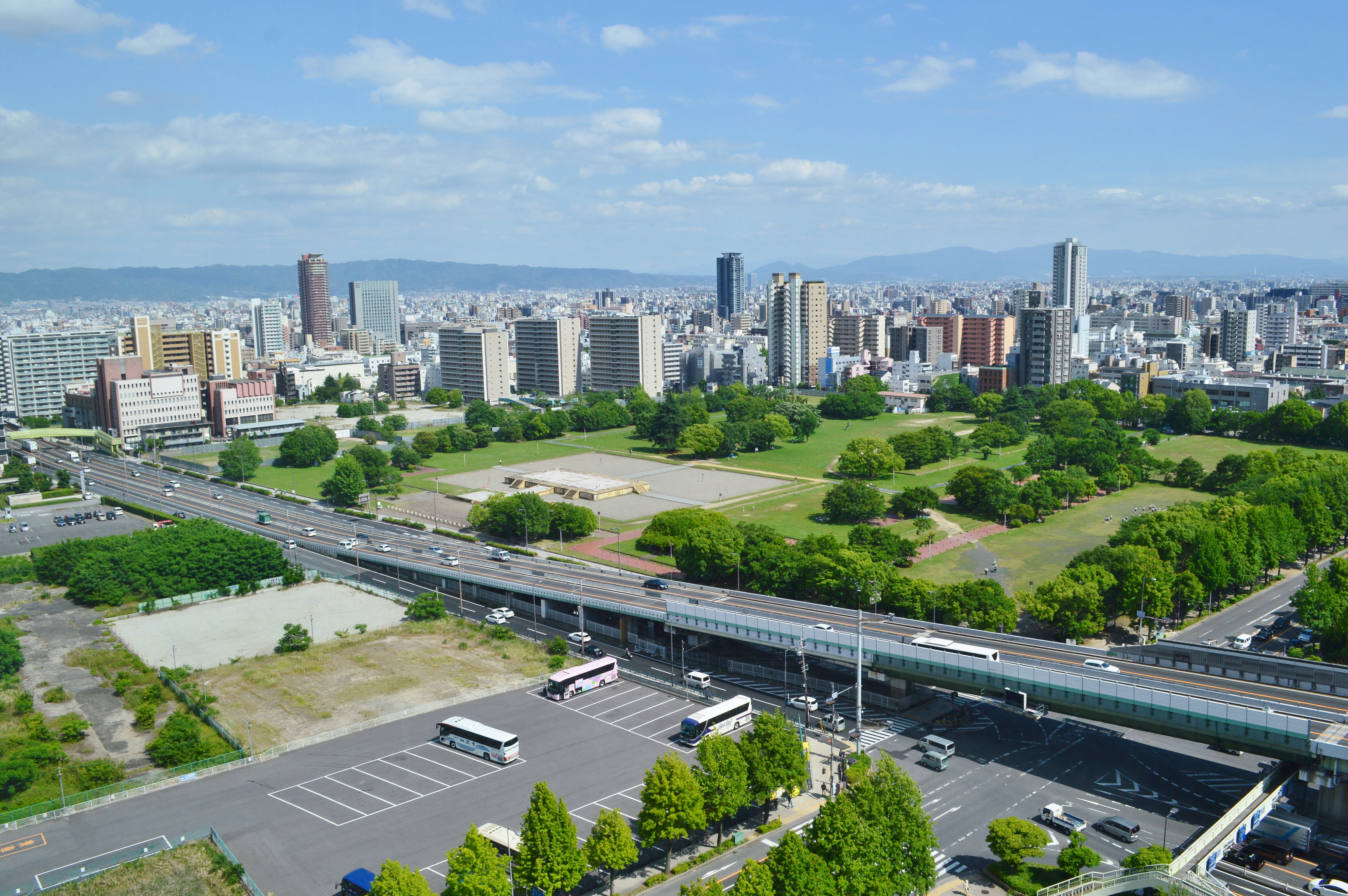 難波宮跡 全景